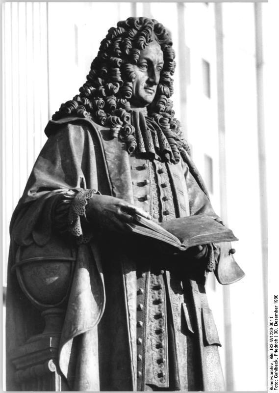 Leipzig, Leibniz-Denkmal ADN-ZB Gahlbeck 30.12.1980 Leipzig: Historie und Gegenwart begegnen sich häufig in Leipzig. In der Nähe des modernen Universitätsgebäudes erinnert ein Denkmal an den Gelehrten Gottfried Wilhelm Leibniz (1646-1716).